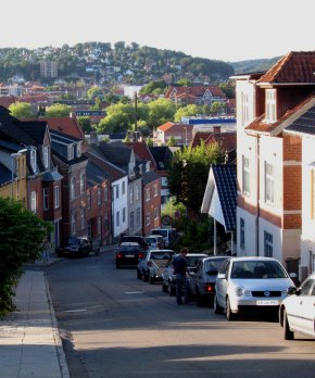 Udsigt fra Kiddesvej i Vejle. (Foto: Danskebjerge.dk)